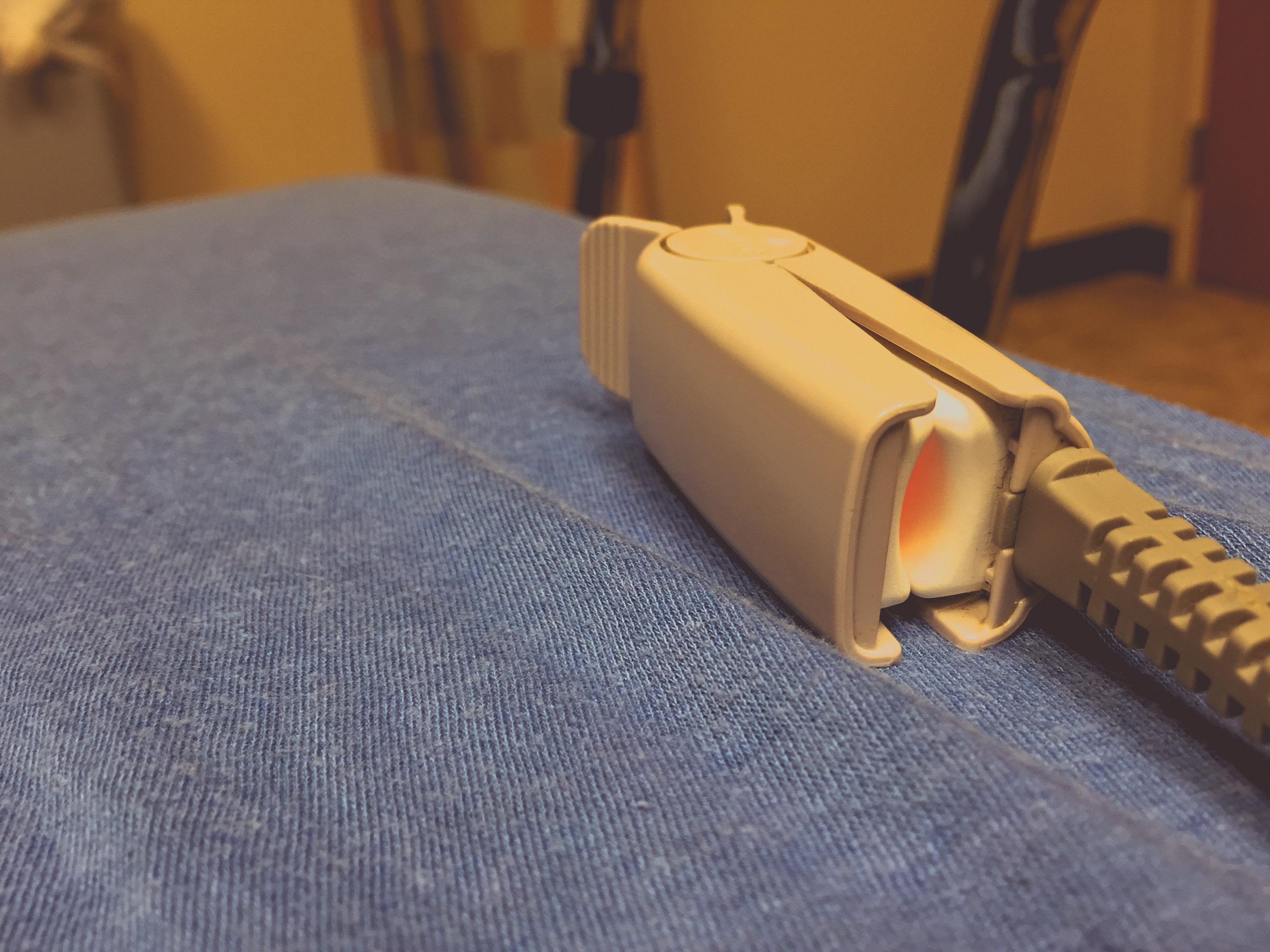 Hospital Pulse Oximeter